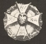 Odznaka uczestnictwa w szarży pod Rokitną